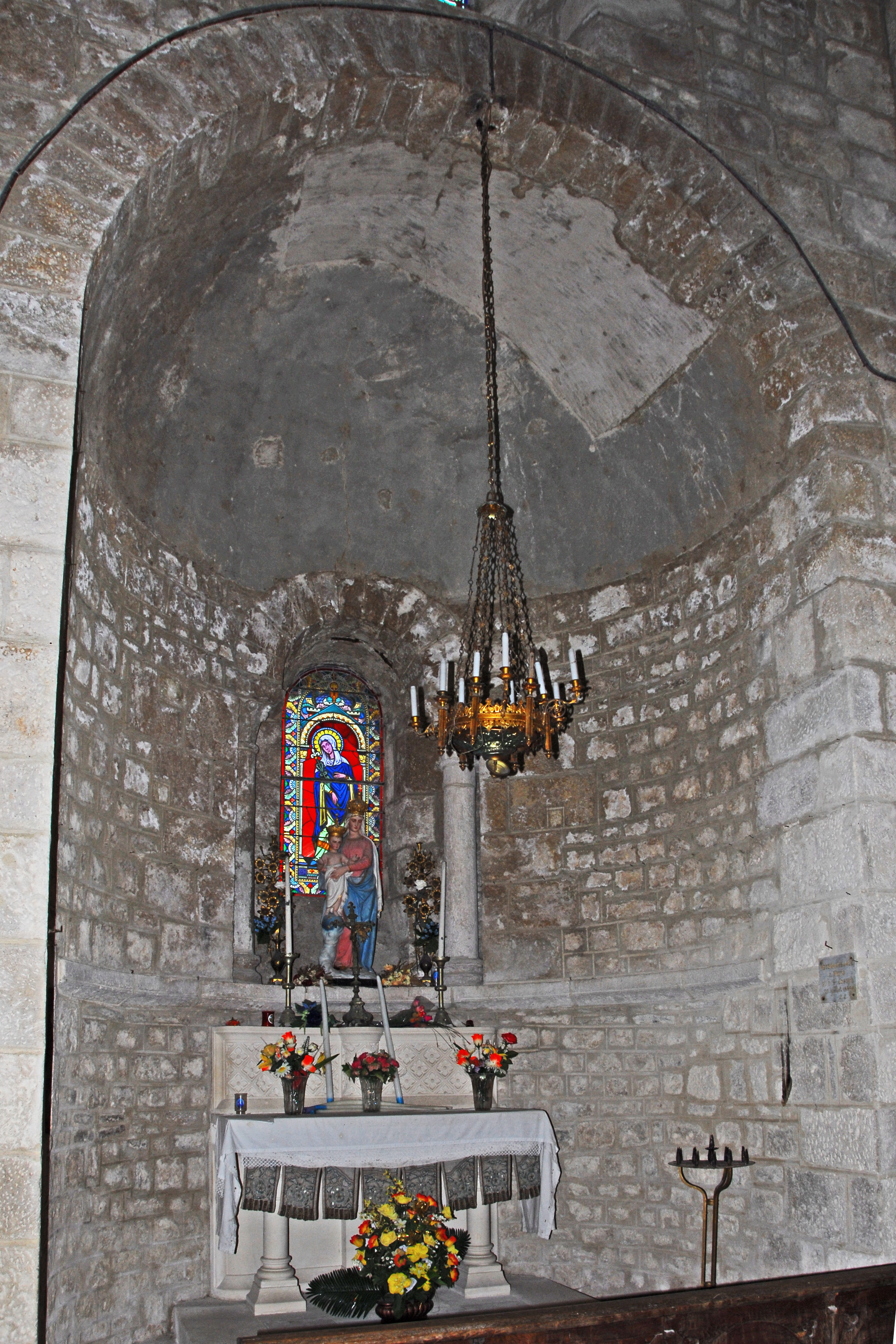 Ste-Croix de Veauce, Querhauskapelle